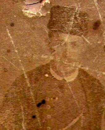 Снимка на Мартин Хайдутин